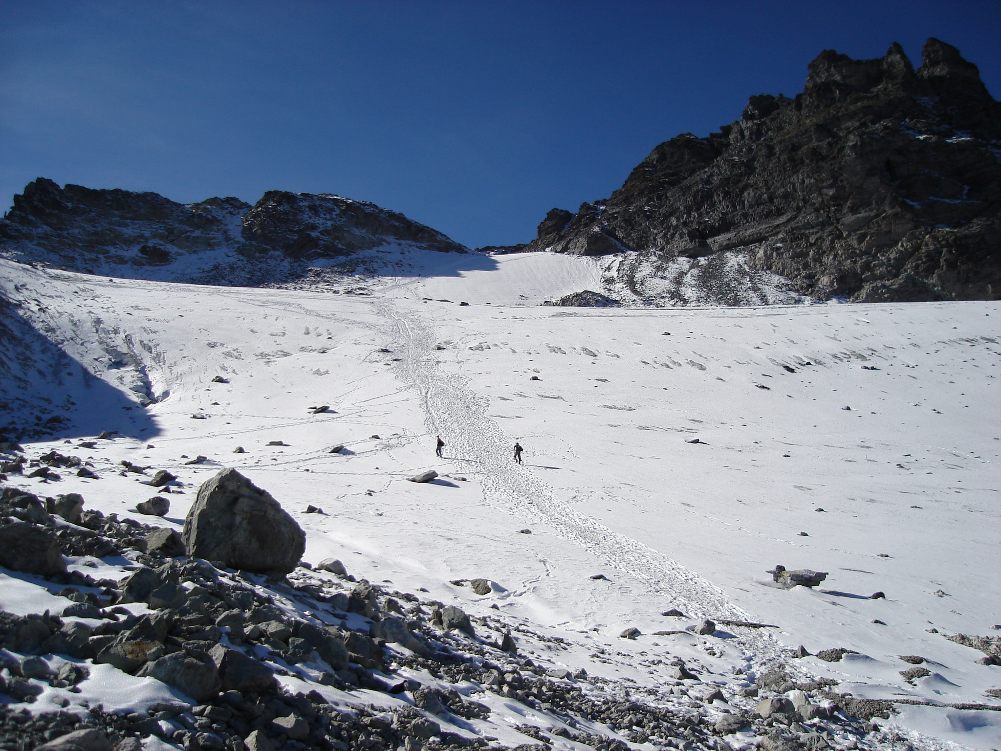 der Pizolgletscher (Stand Herbst 2006)